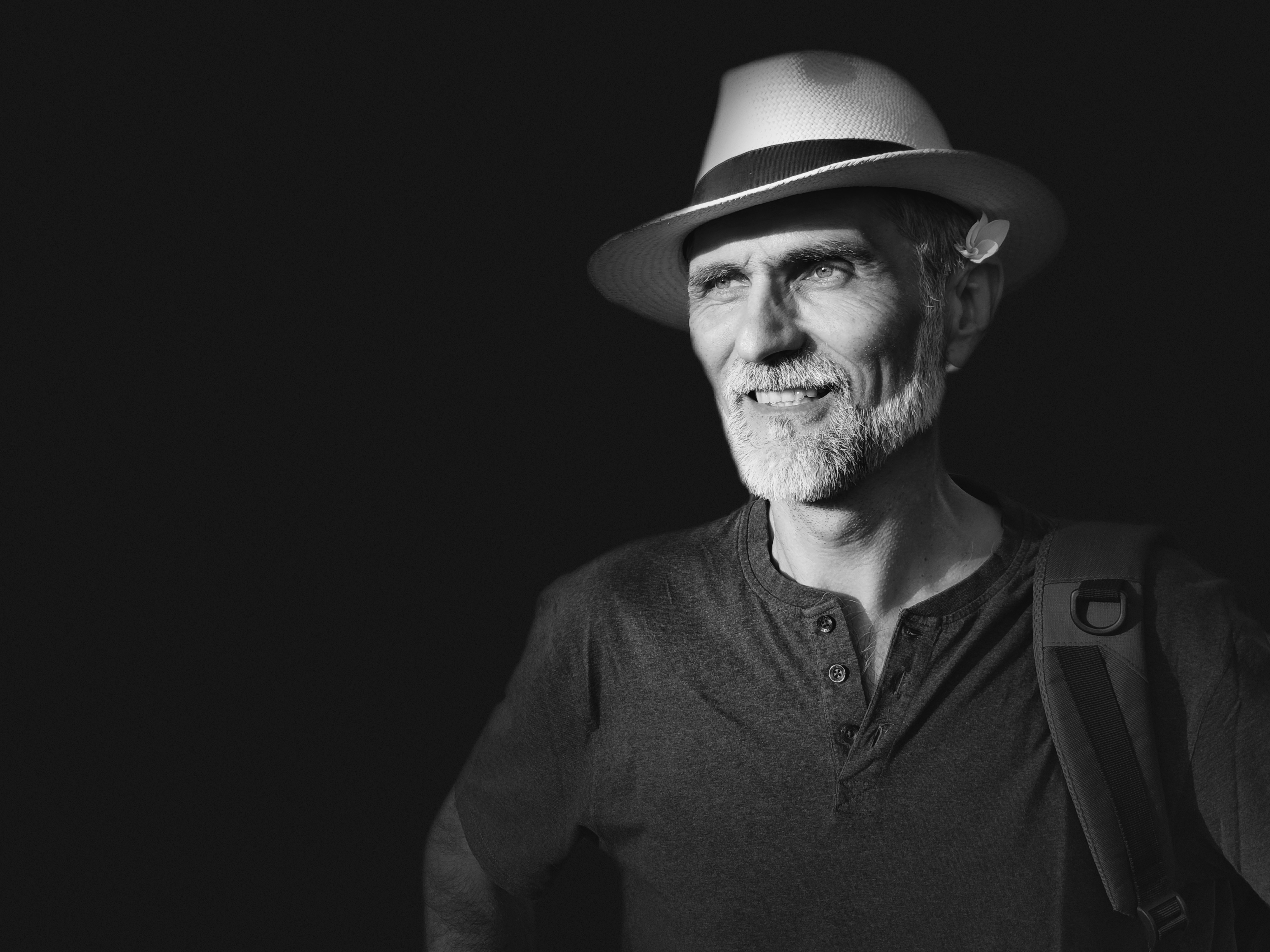 Milenko Aćimović Aćim, srpski slikar i sokolar. Foto Stojan Aćimović (po odobrewu).